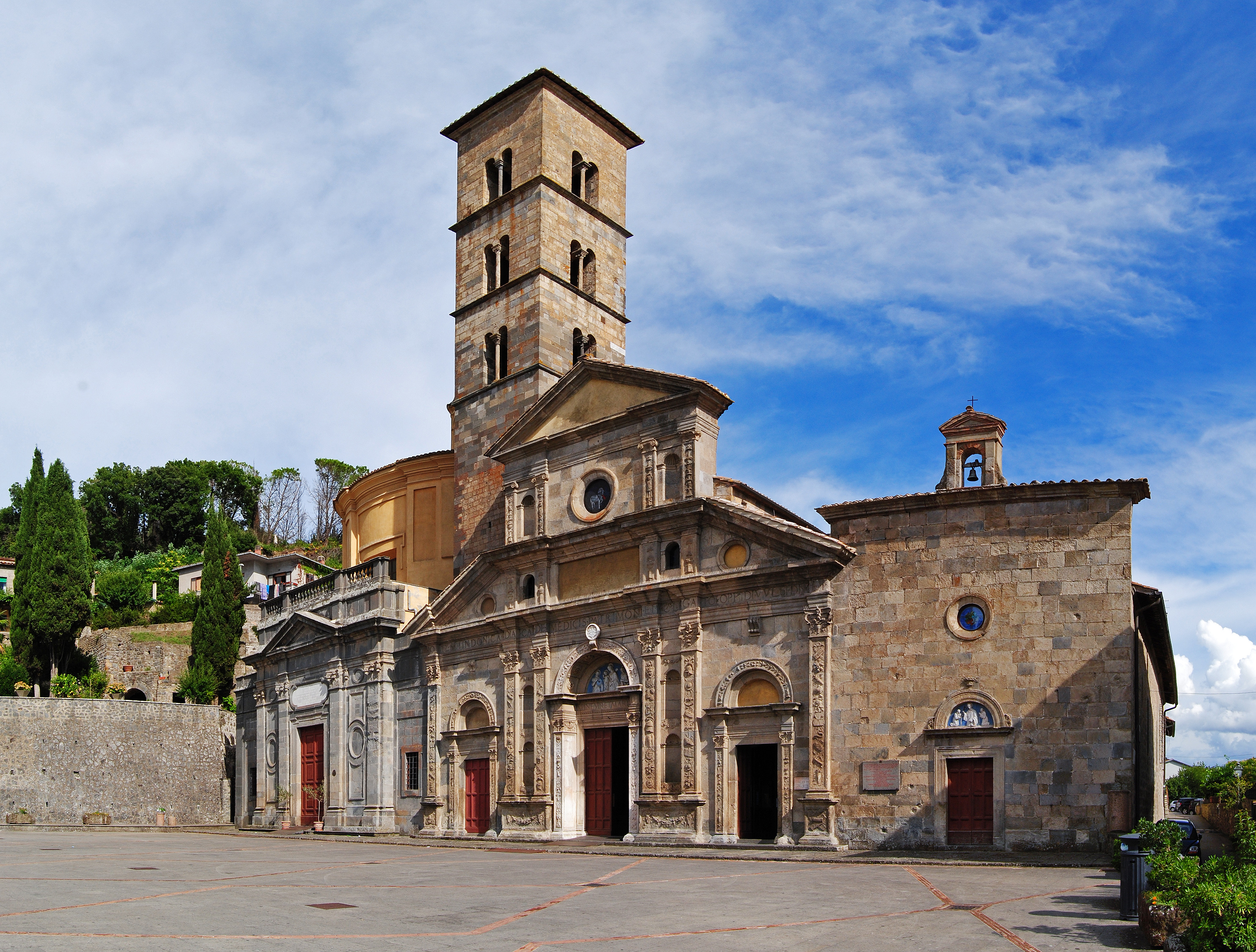 Chiesa di Santa Cristina in Bolsena (VT) Italia, agosto 2015